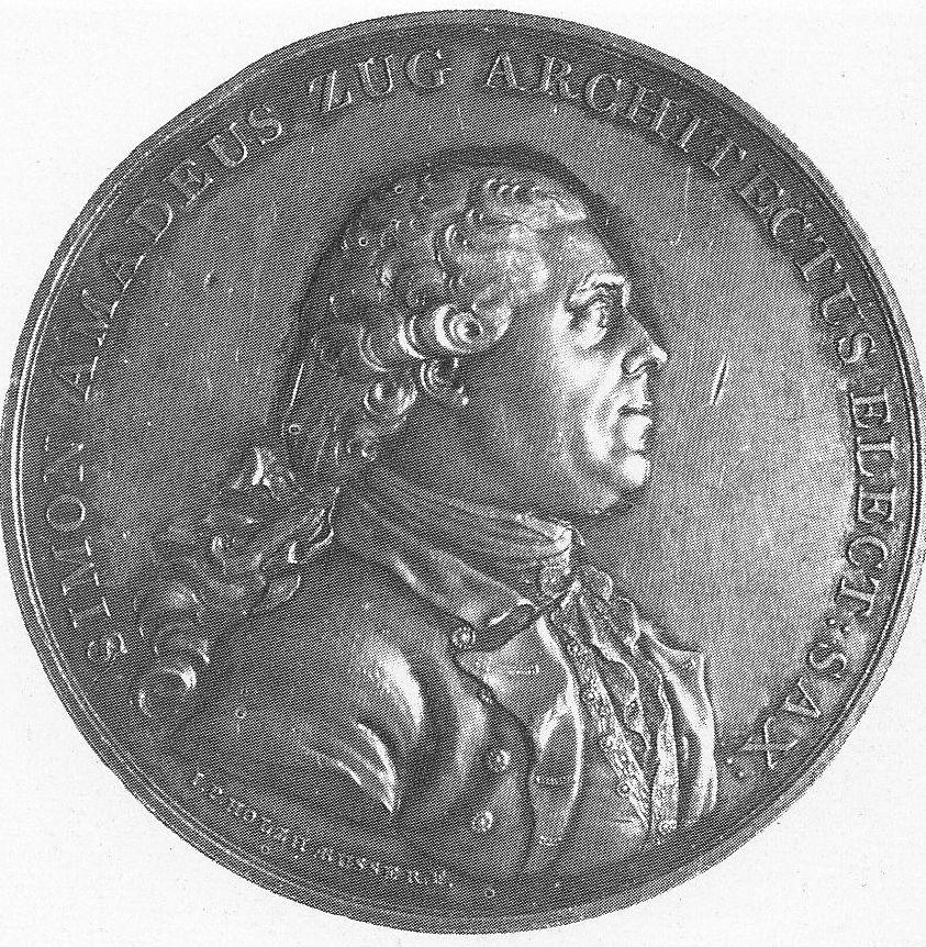 Szymon Bogumił Zug na medalu srebrnym wybitym przez Jana Filipa Holzhaeussera